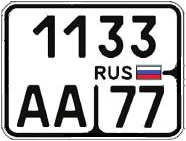 Номерной знак мотоциклов, с 2019 года